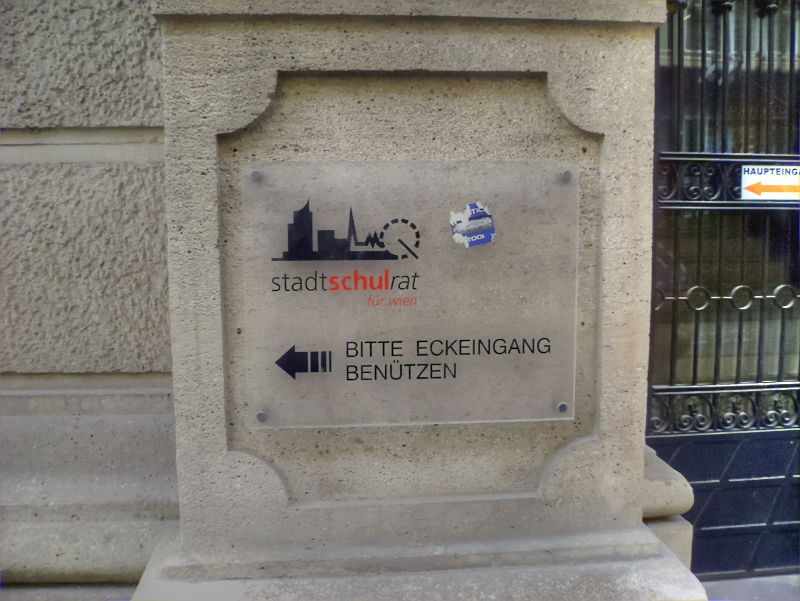 das Haus Wipplingerstraße 28 im 1. Bezirk, in Wien